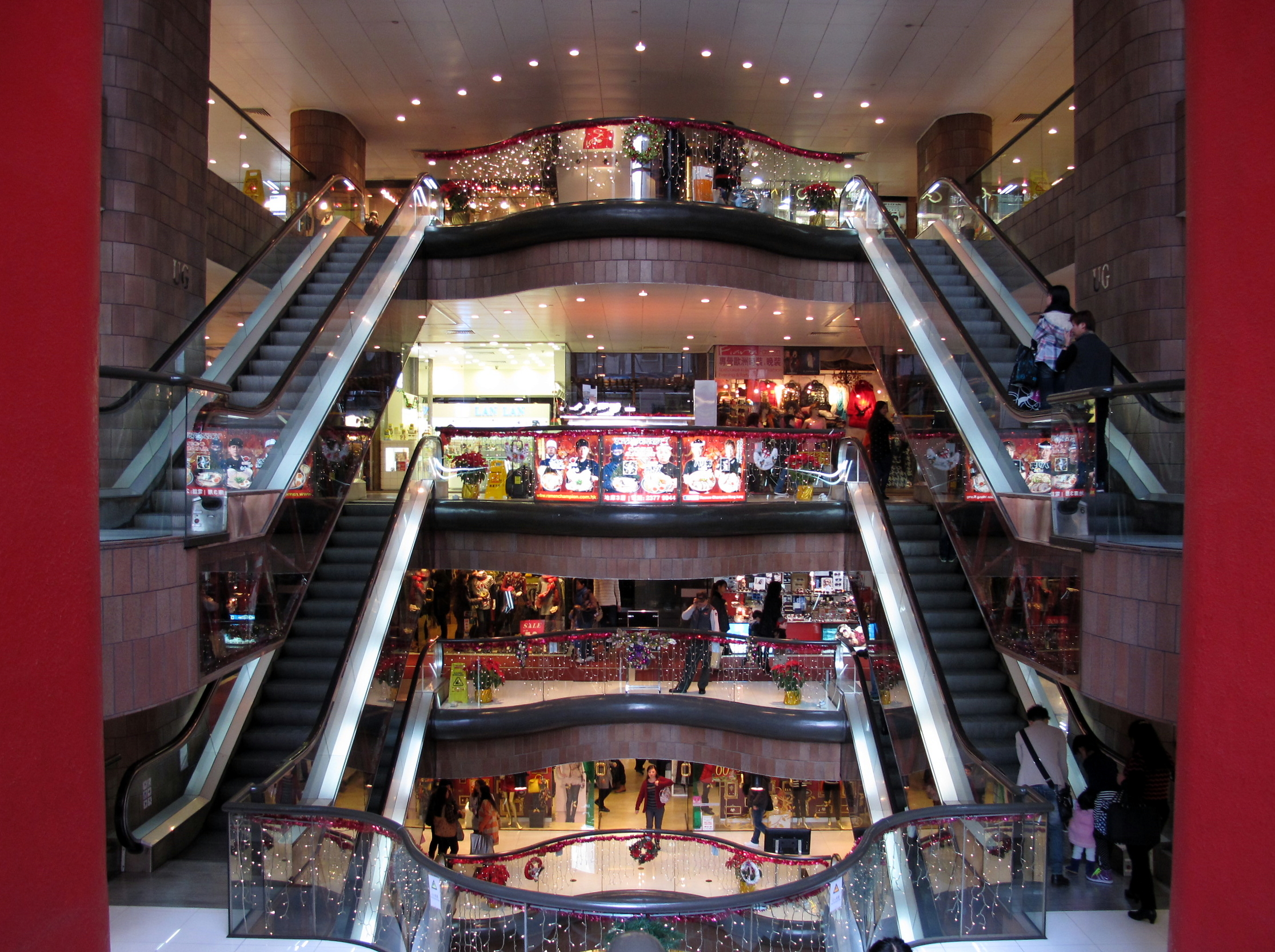 Prudential Centre Atrium, Jordan